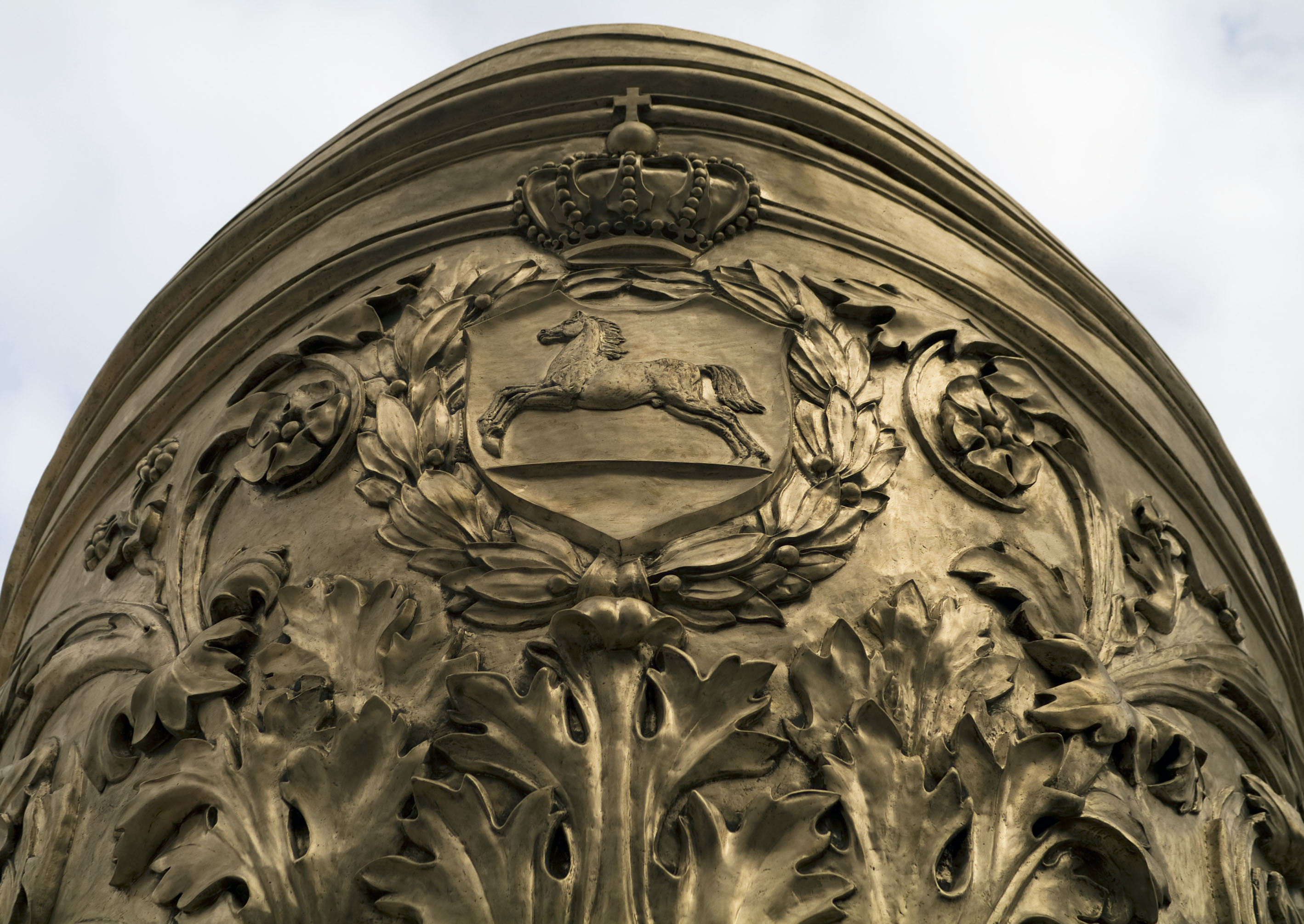 Die Frontseite des Streitwagens der Braunschweiger Quadriga vor der Aufstellung auf dem Schloss am 18.10.2008